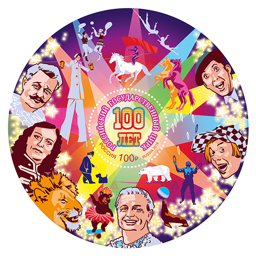 Почтовый блок России, выпущенный 30 октября 2019 года и посвящённый 100-летию Российского государственного цирка, берущего начало от вышедшего 26 августа 1919 года декрета Совета Народных Комиссаров «Об объединении театрального дела». На блоке изображены разновидности цирковых представлений и портреты (по часовой стрелке начиная с верхнего правого угла) Юрия Никулина, Олега Попова, Вальтера Запашного, Ирины Бугримовой, Владимира Дурова. Художник — С. Ульяновский. Номер по каталогу ЦФА — 2565. Тираж — 30000 экз.